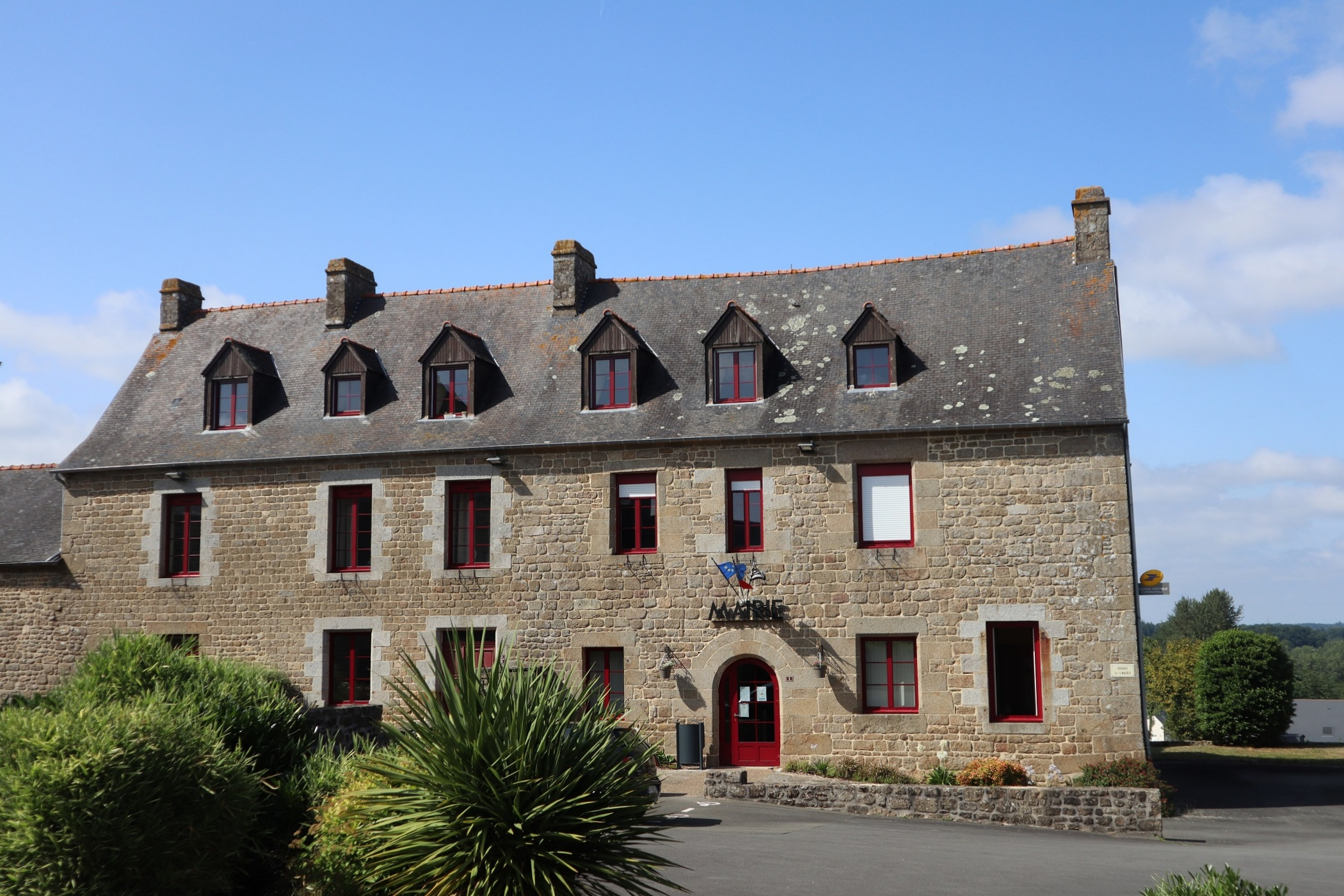 Saint-Hilaire-des-Landes (35) Mairie - 0